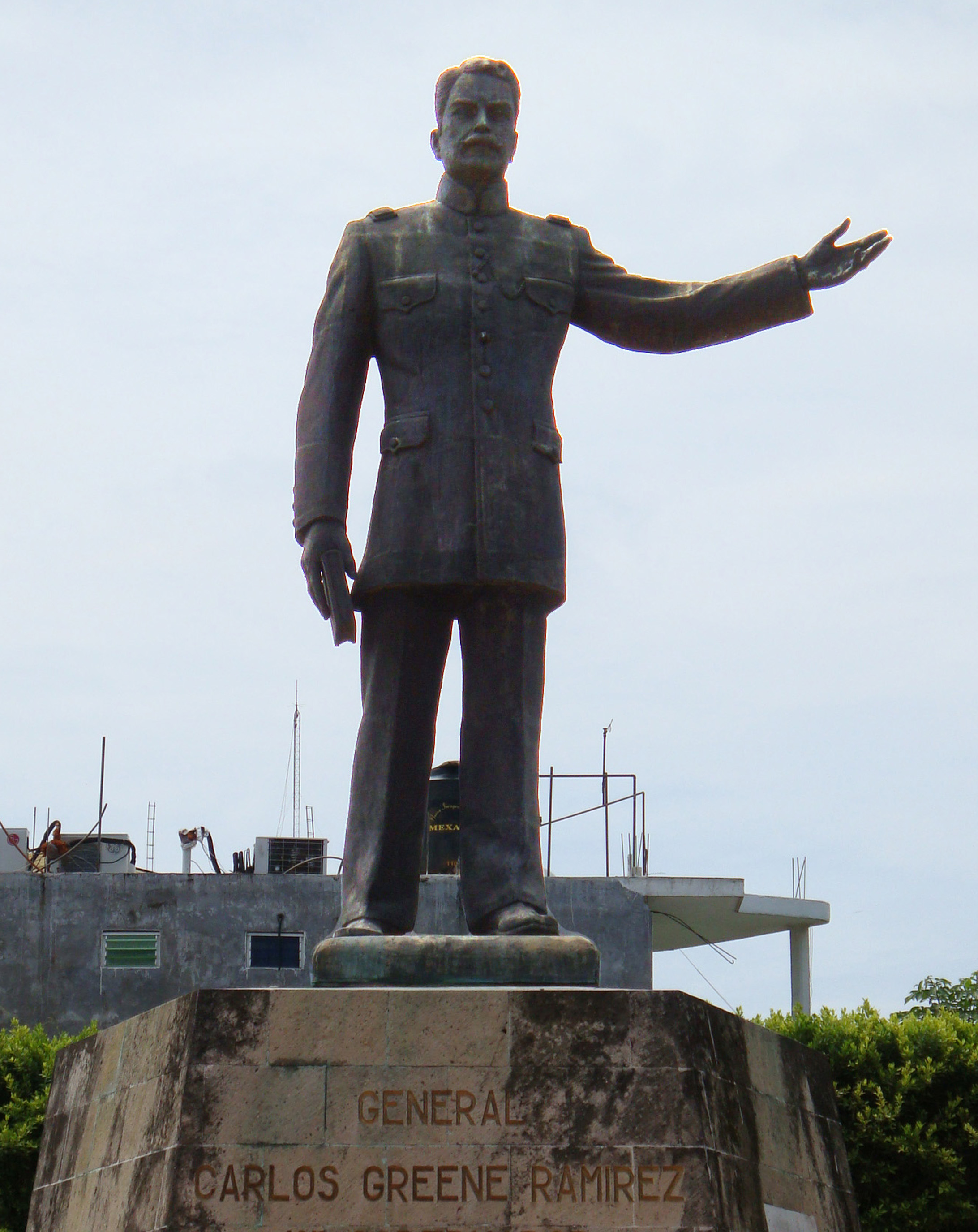 Estatua en honor al General Carlos Greene Ramírez, revolucionario tabasqueño y ex Gobernador del estado de Tabasco, México.